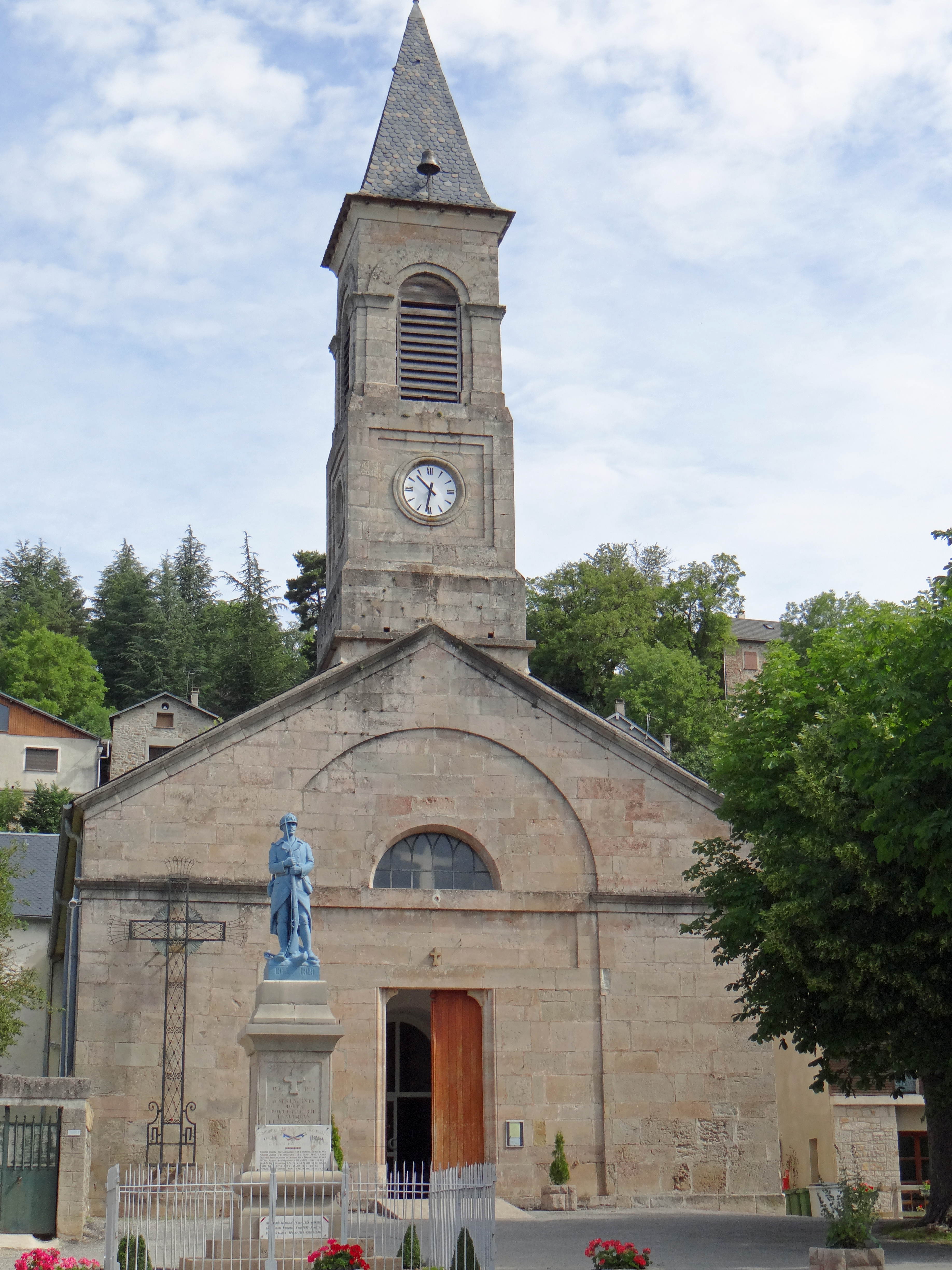 Lanuéjols - Église Saint-Laurent - Façade et monument aux morts